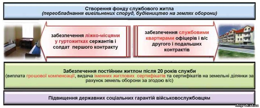 Підвищення мотивації до військової служби під час реформ в українській армії